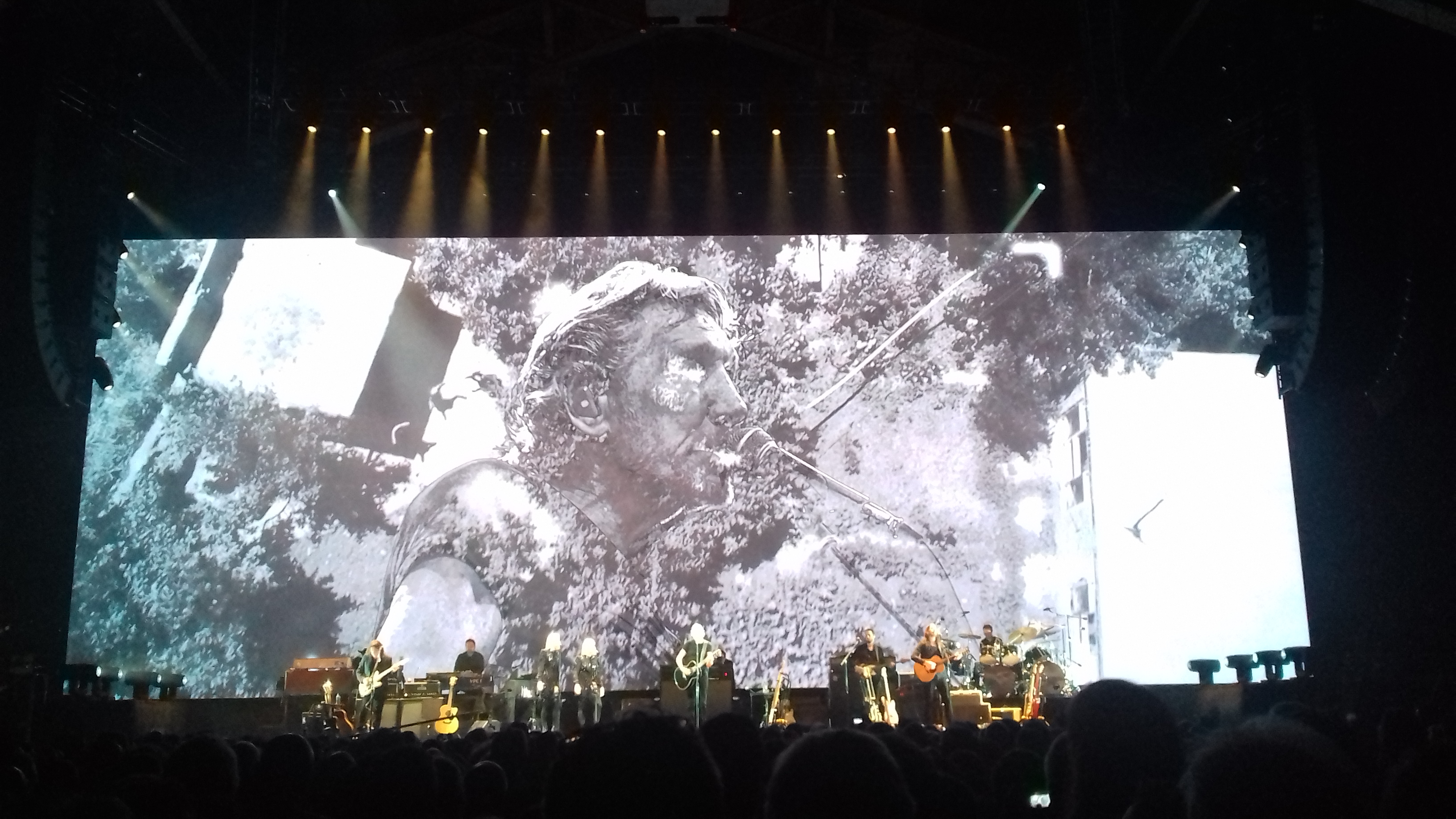 Roger Waters koncertanta en la Halle Tony Garnier en Liono, la 9an de majo 2018